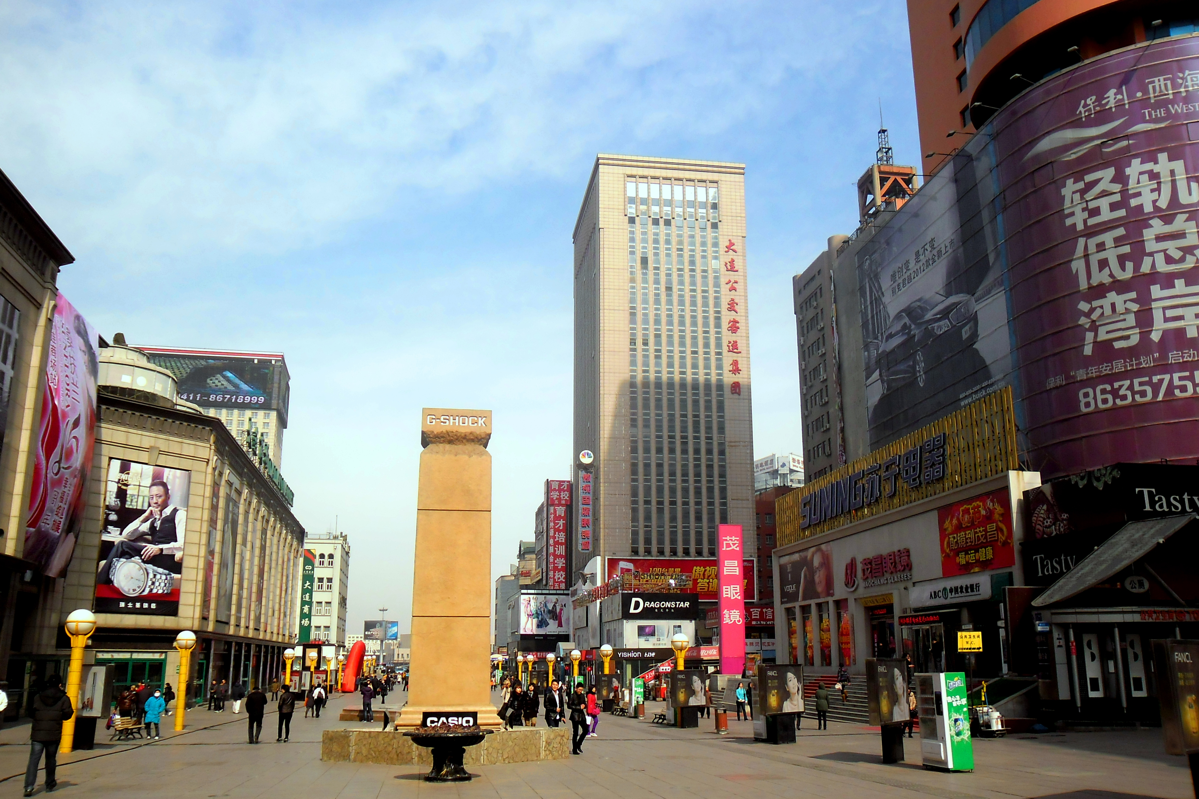 中文（中国大陆）: 辽宁省大连市